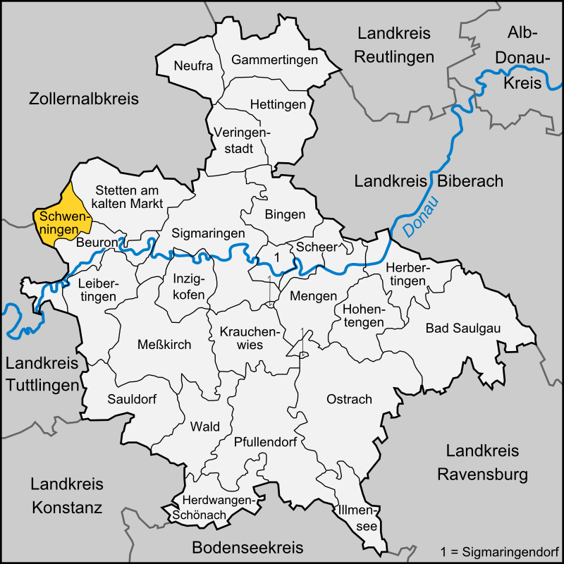 Karte der Gemeinde Schwenningen im Landkreis Sigmaringen